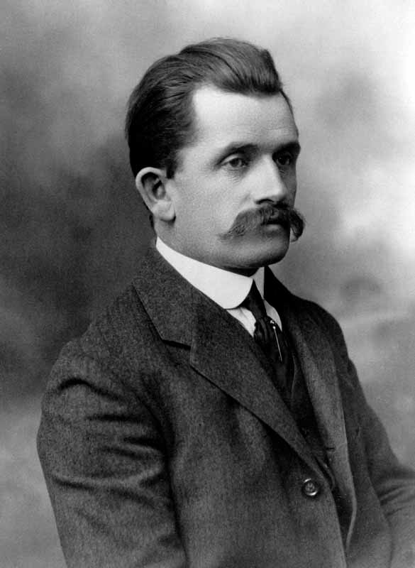 Portrait Ferdinand porsche